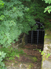 Ehemaliger Eingang zum Bergwerk Wilhelmsglück